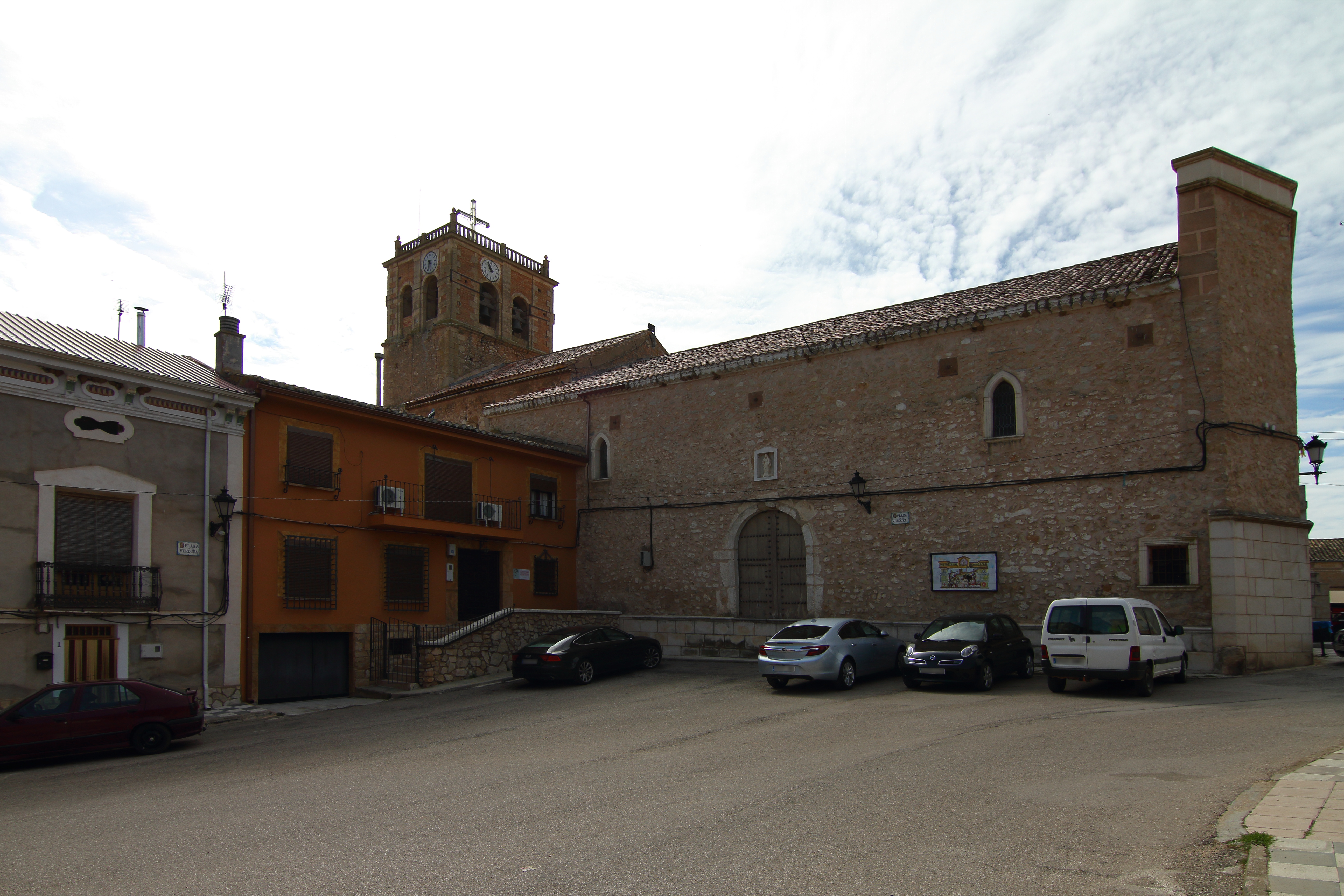 Valverde de Júcar, Iglesia de Santa María Magdalena, fachada norte